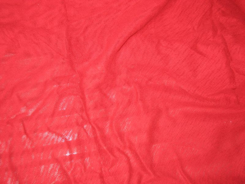 Red cotton tulle. Tessuti remnant